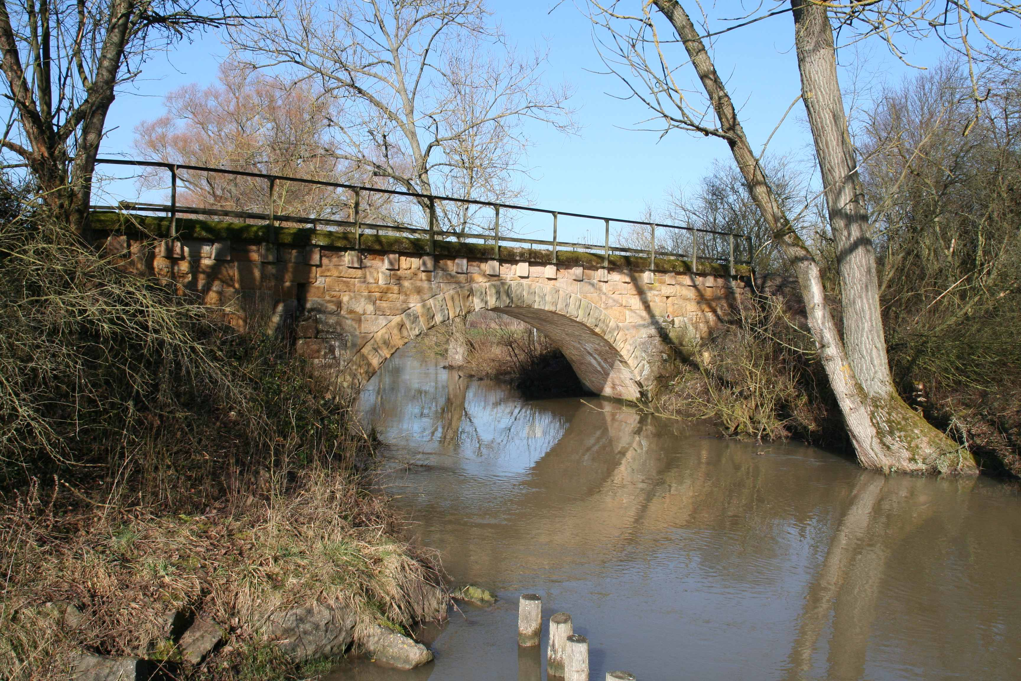 Ehemalige Eisenbahnbrücke über die Rodach Seßlach, Landkreis Coburg